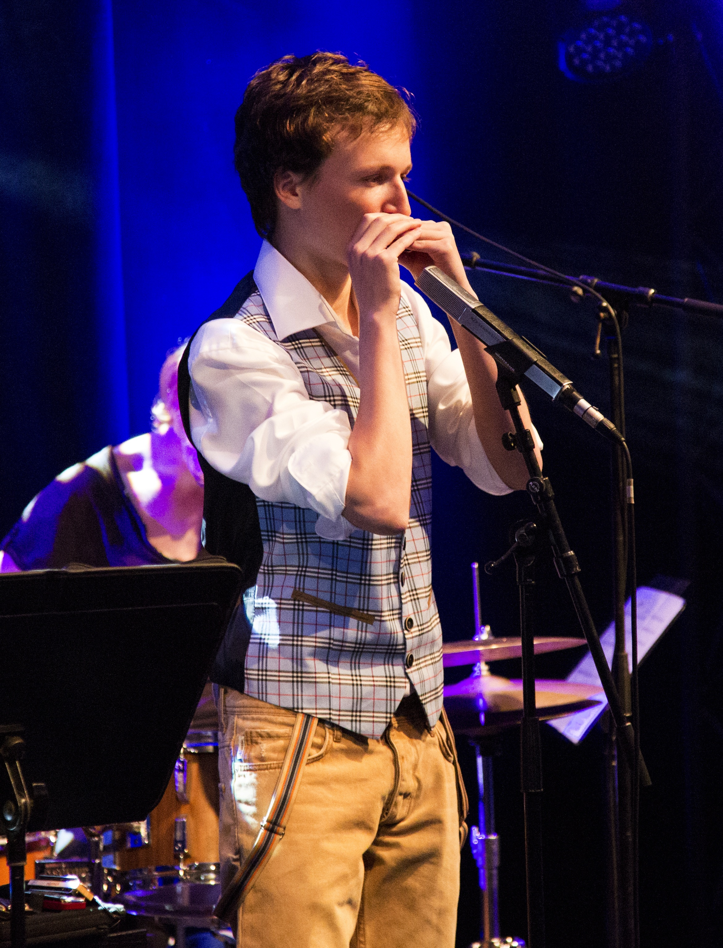 Jazz Festival Viersen